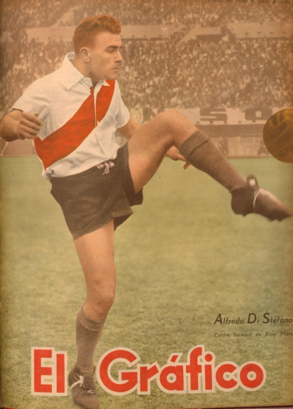 Di Stéfano en 1947.